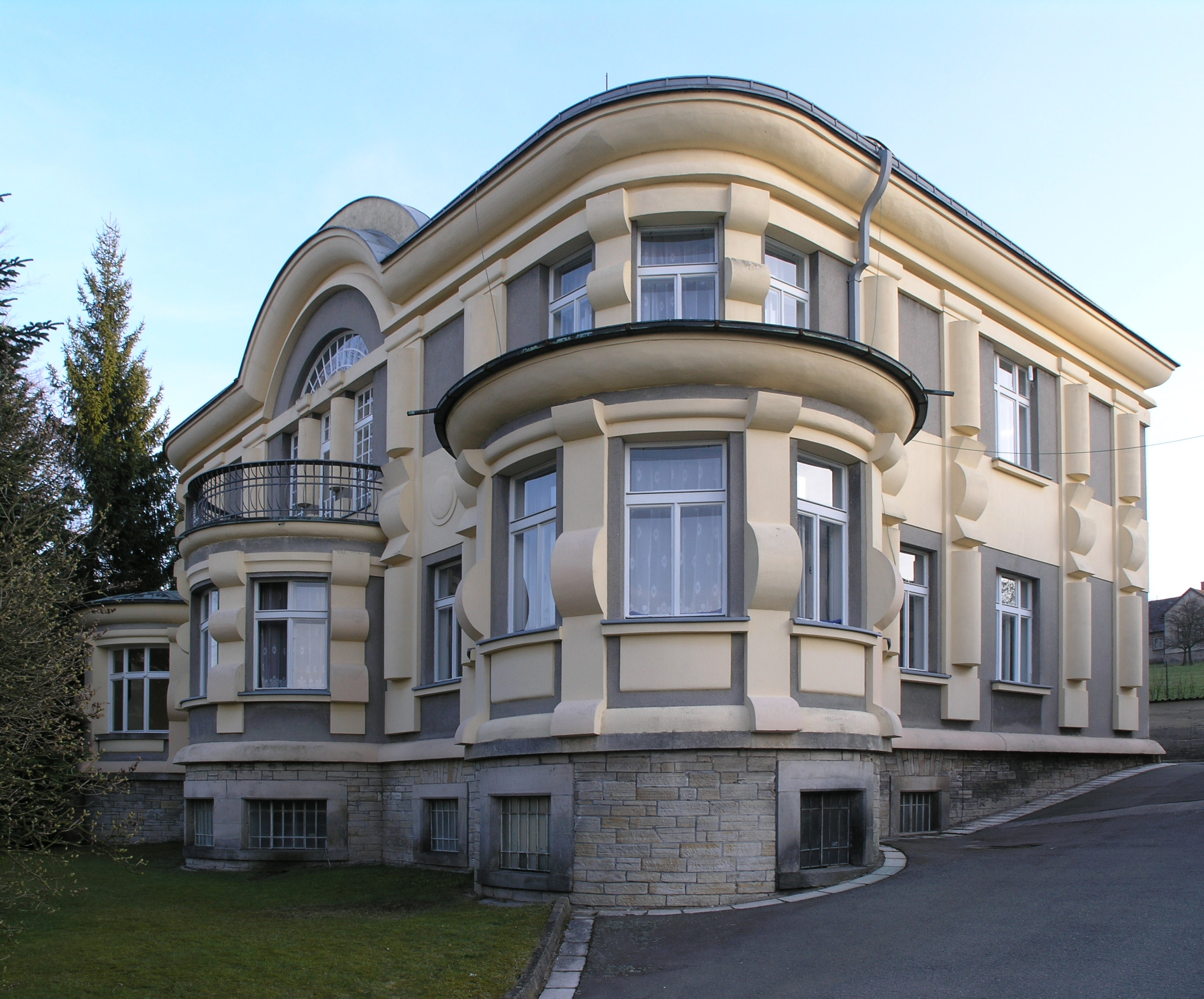 Červený Kostelec - Budova Základní umělecké školy, původně vila továrníka Theodora Keyzlara. Projektoval arch. Josef Gočár, stavbu provedl červenokostelecký stavitel Josef Pitřinec v letech 1923 až 1924.